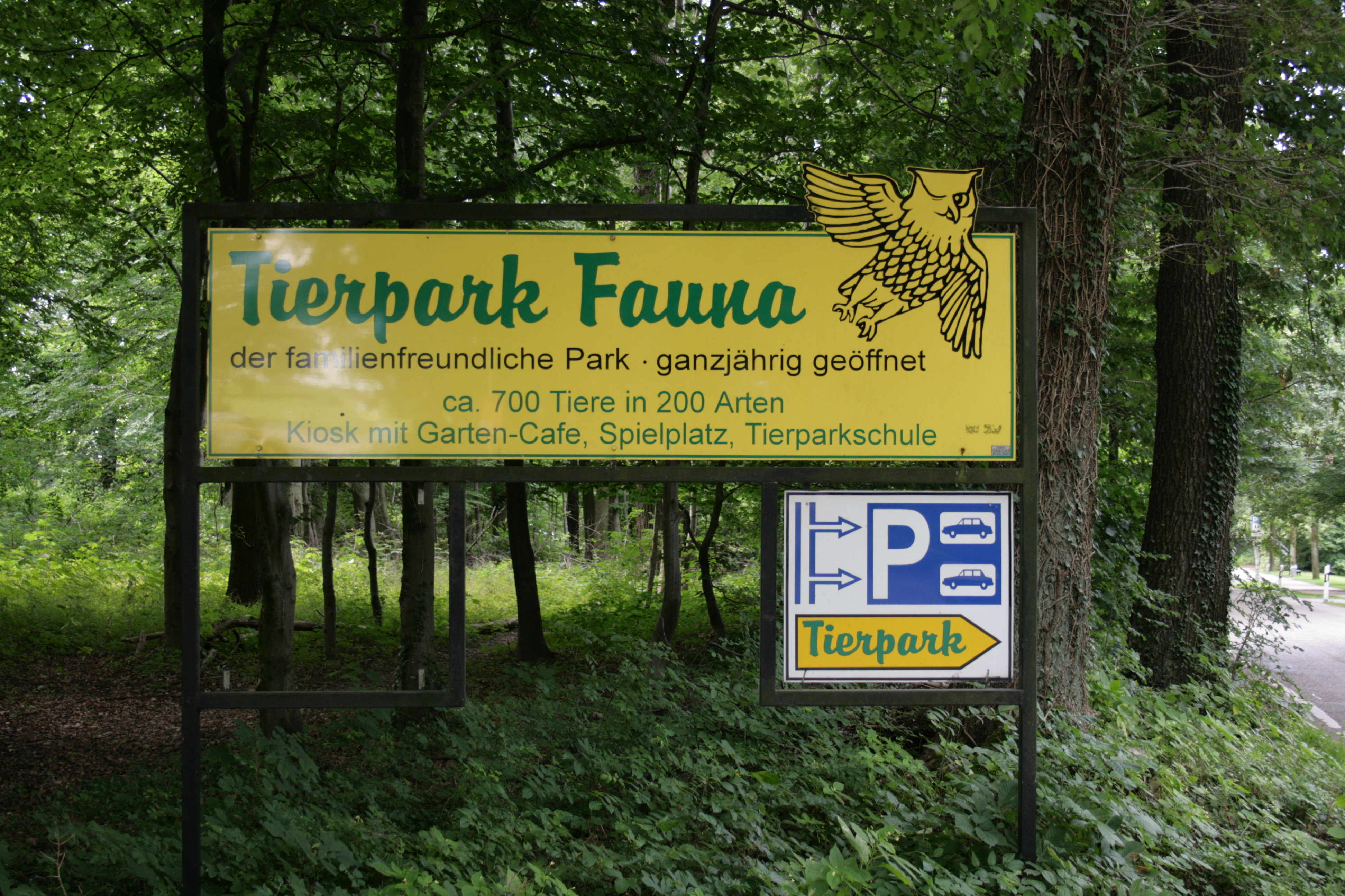 Tierpark Fauna in Solingen-Gräfrath